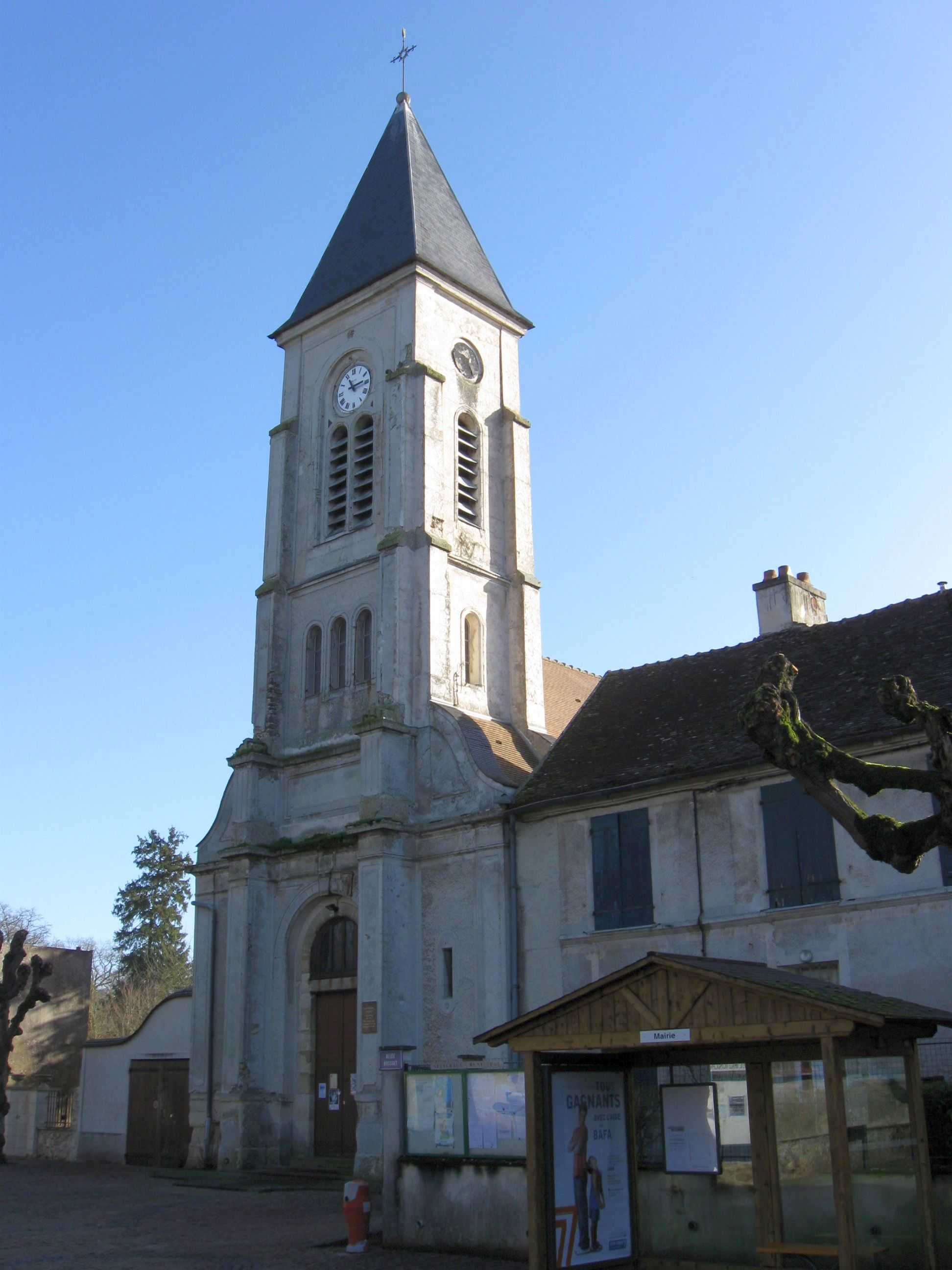 Église Saint-Barthélemy de Germigny-l'Évêque. (Seine-et-Marne, région Île-de-France).